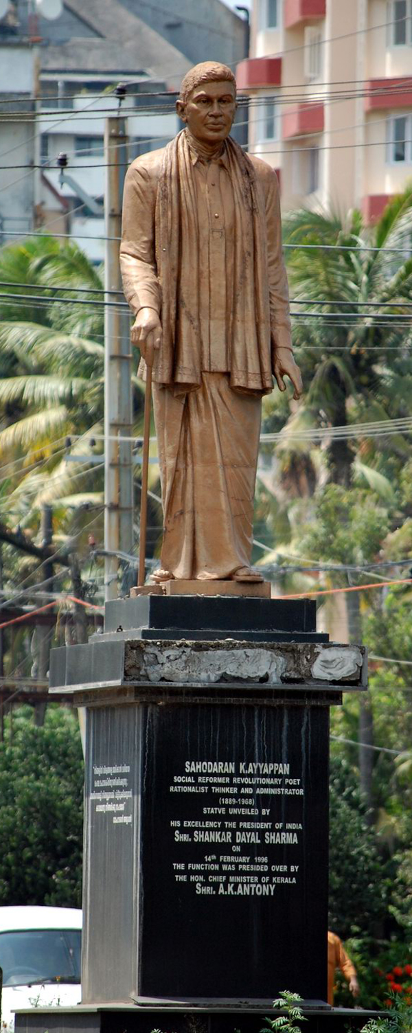 സഹോദരൻ-അയ്യപ്പൻ-സ്മാരകം-കൊച്ചി